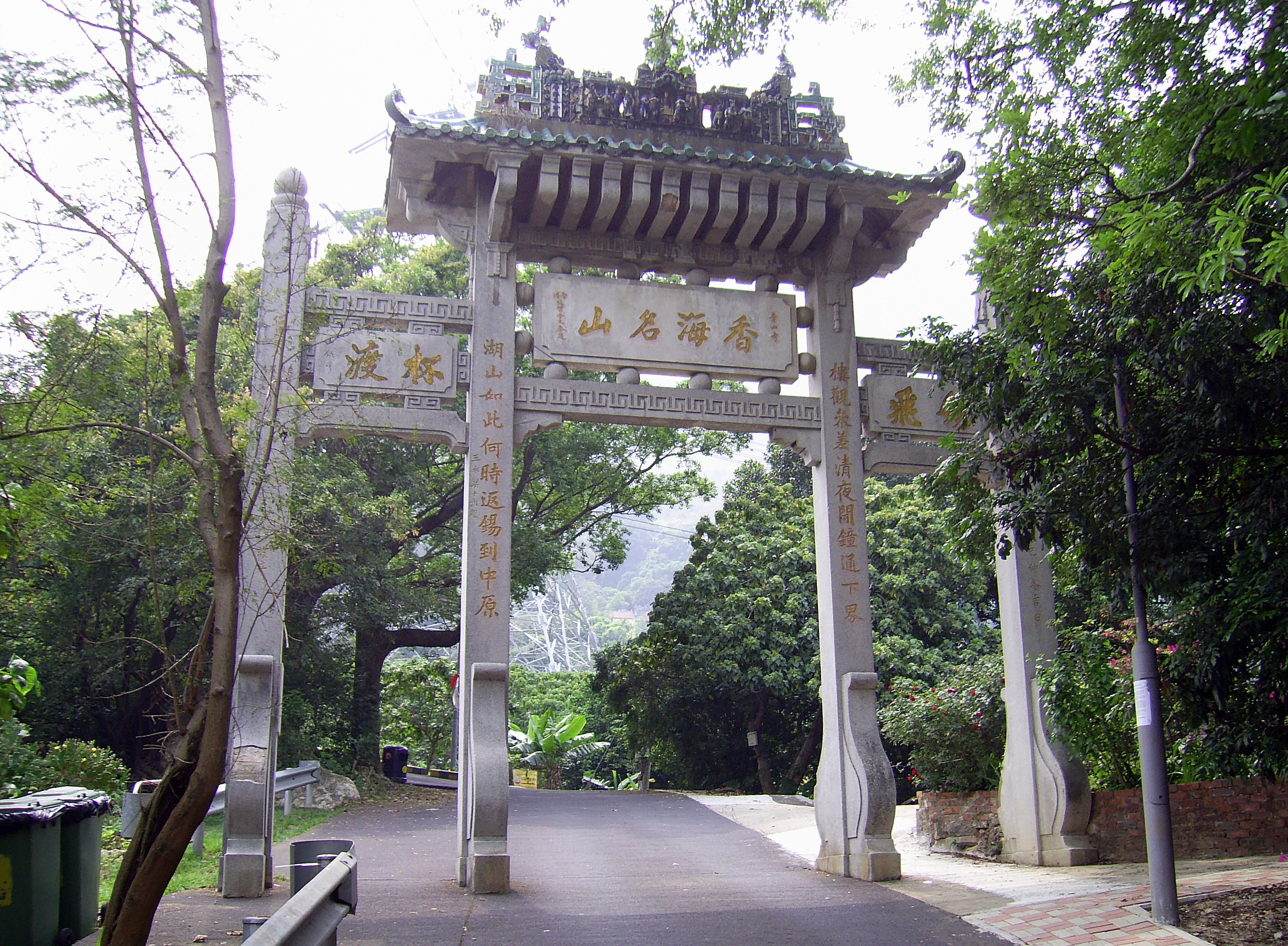 中文（香港）: 青山禪院香海名山牌坊